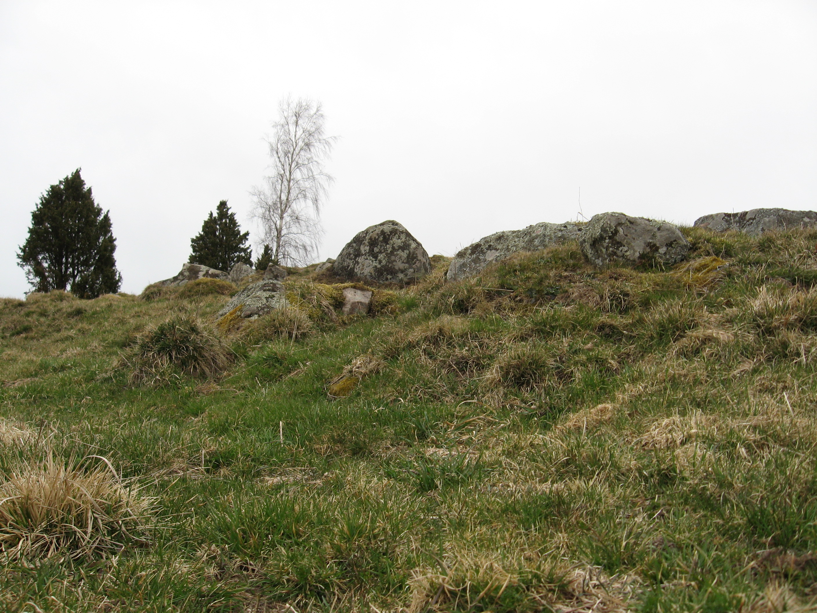 Gravfält vid Greby, Hassle socken, Mariestads kommun, Vadsbo härad, f.d. Skaraborgs län, Västergötland, Västra Götalands län, Sverige.